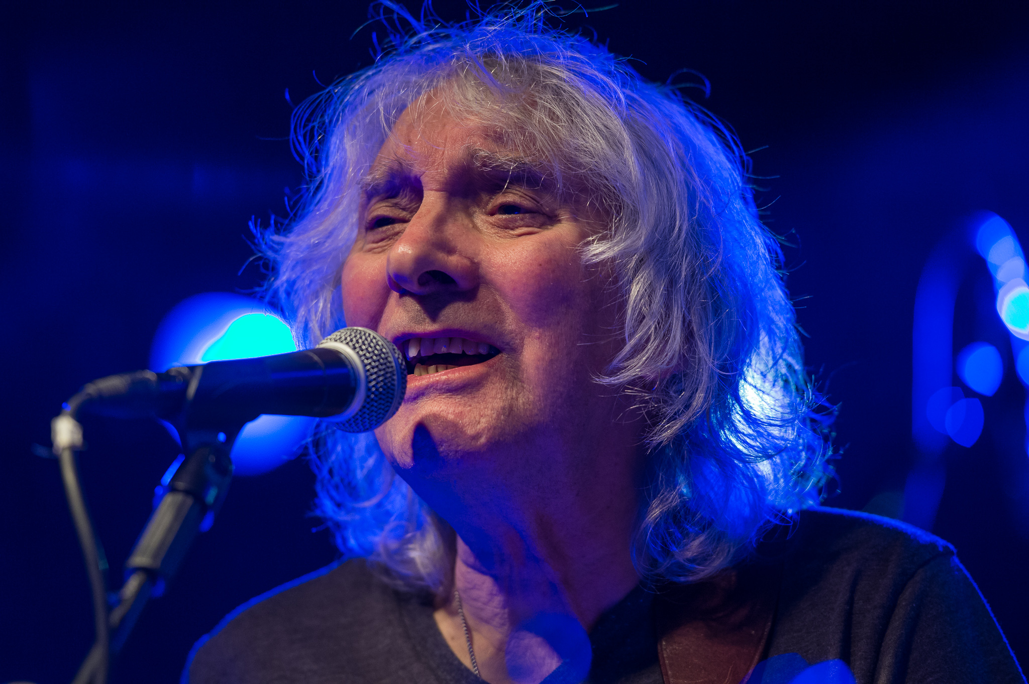 Albert Lee,Concertbüro Franken,Der Hirsch,Konzert,Livekonzert,Livemusik,Musik